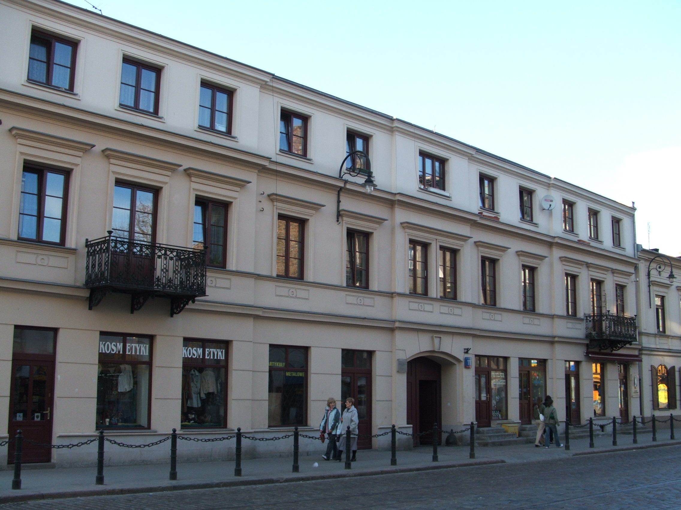 budynek przy ul. Ząbkowskiej 11 w Warszawie - "Kamienica Icka Hersza Jahrmana"